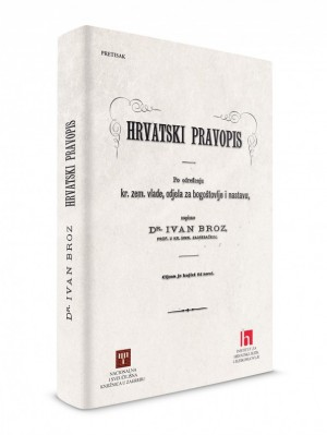 Ivan Broz, Hrvatski pravopis, 1892., pretisak